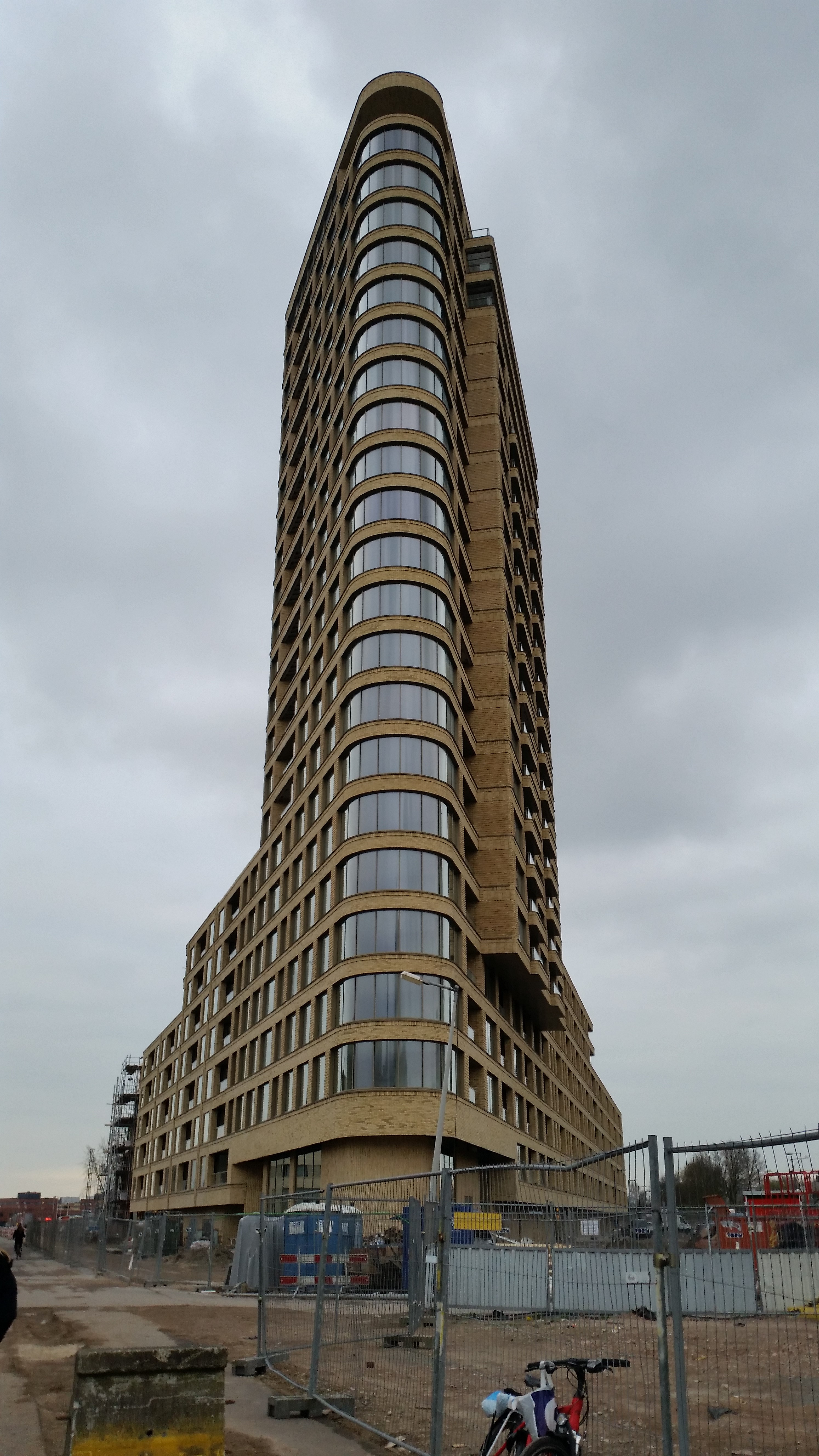 State Amstelkwartier aan de Solitudolaan/Lindenhoeveweg, Amstelkwartier